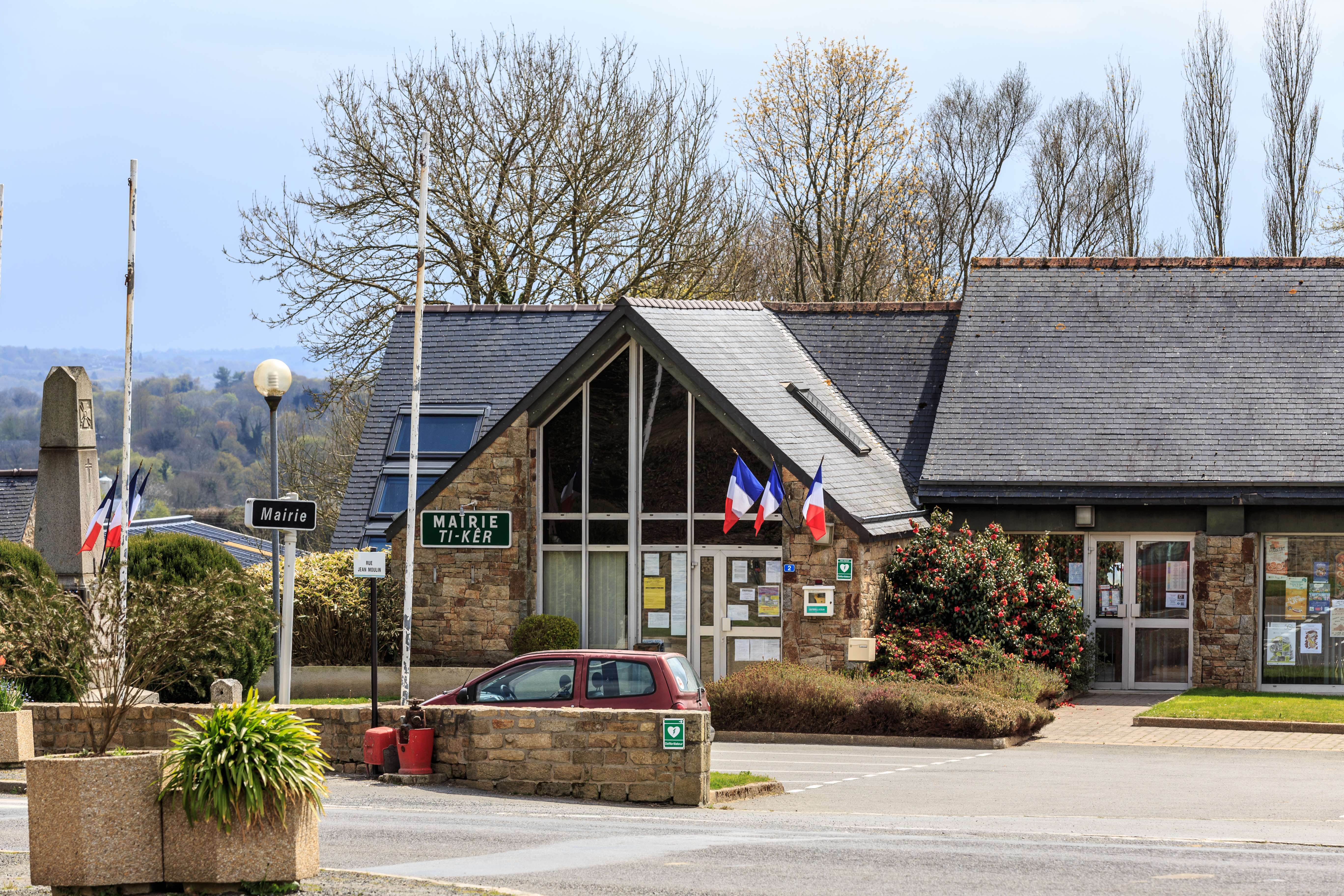 Mairie de Plounévez-Moëdec (22).